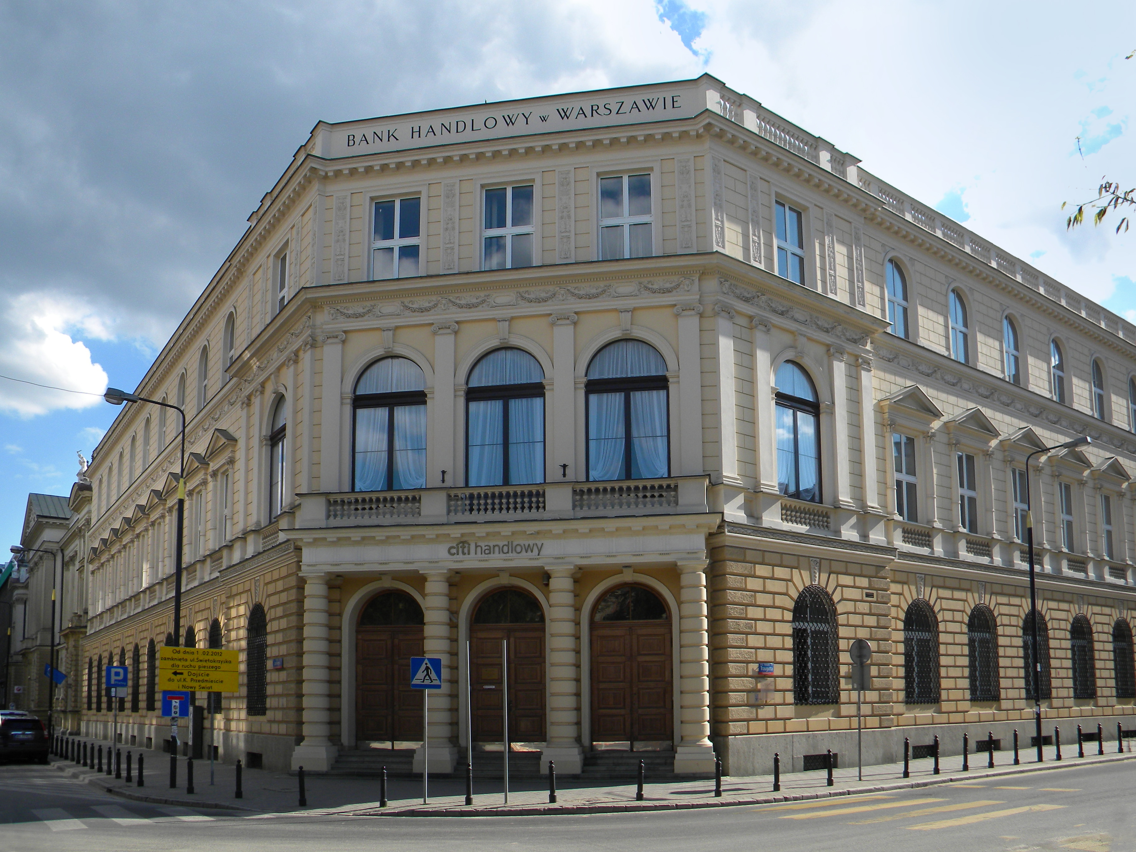 Historyczna siedziba Banku Handlowego w Warszawie na ulicy Traugutta (dawniej Berga)